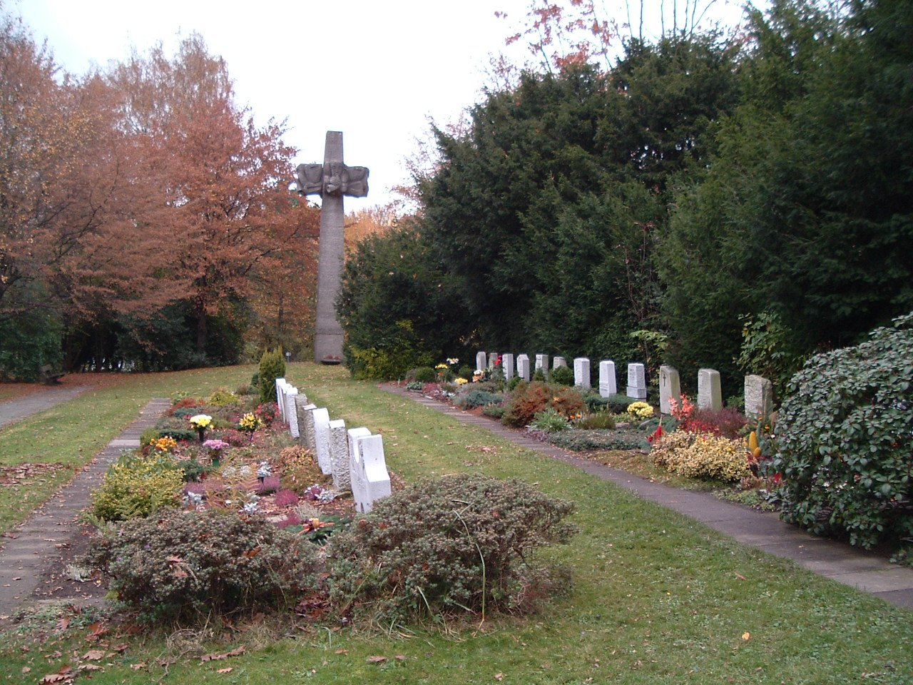 Denkmalkreuz und Gräber für Opfer des Eisenbahnunglücks in Radevormwald 1971 Fotografiert von Benutzer:Taube Nuss im Oktober 2004